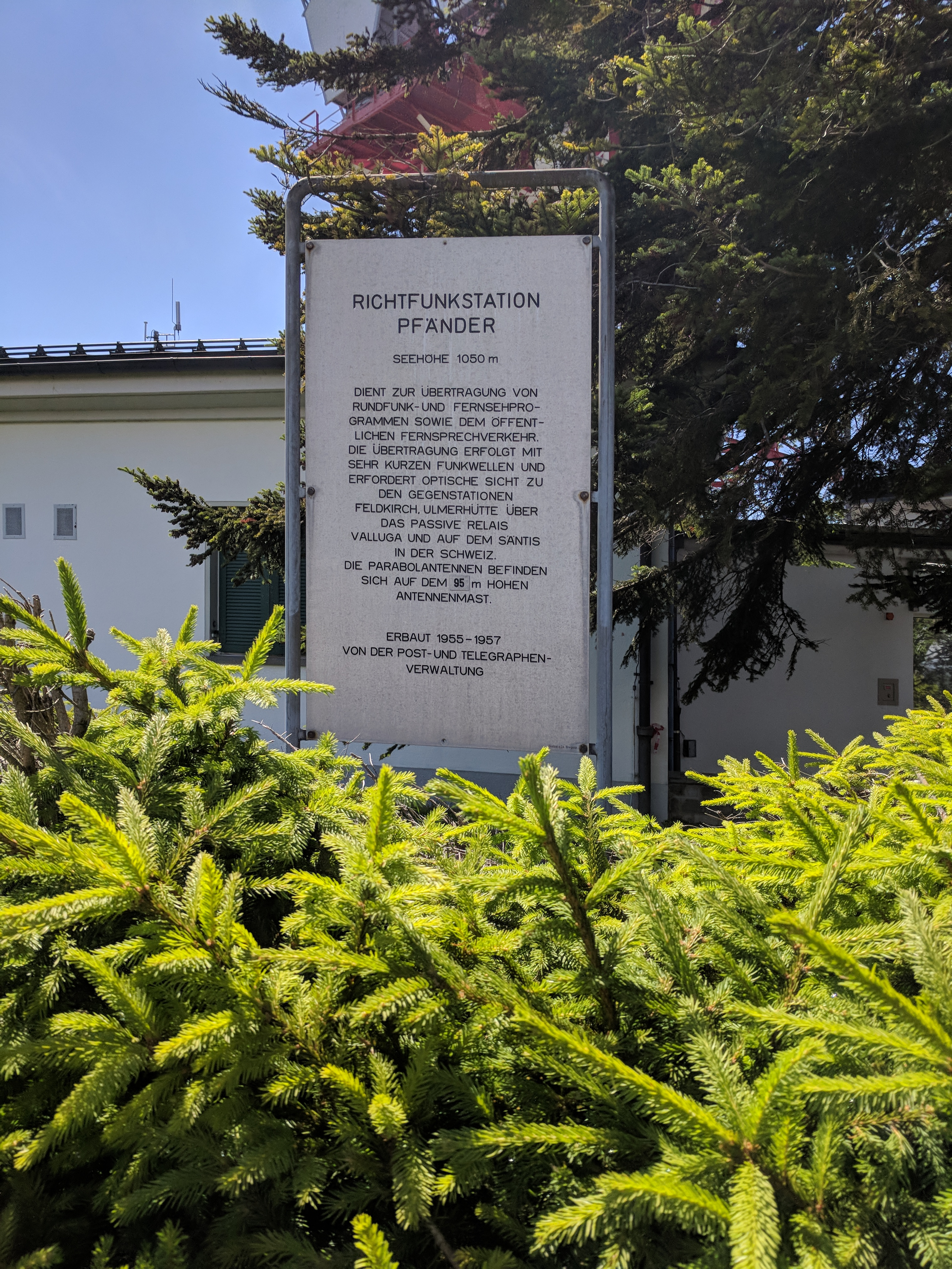 Infotafel am Sender Pfänder“RICHTFUNKSTATION PFÄNDER / Seehöhe 1050 m / dient zur Übertragung von Rundfunk- und Fernsehprogrammen sowie dem öffentlichen Fernsprechverkehr. Die Übertragung erfolgt mit sehr kurzen Funkwellen und erfordert optische Sicht zu den Gegenstationen Feldkirch, Ulmerhütte über das passive Relais Valluga und auf dem Säntis in der Schweiz. / Die Parabolantennen befinden sich auf dem (95) m hohen Antennenmast. / Erbaut 1955-1957 / von der Post- und Telegraphen-Verwaltung”